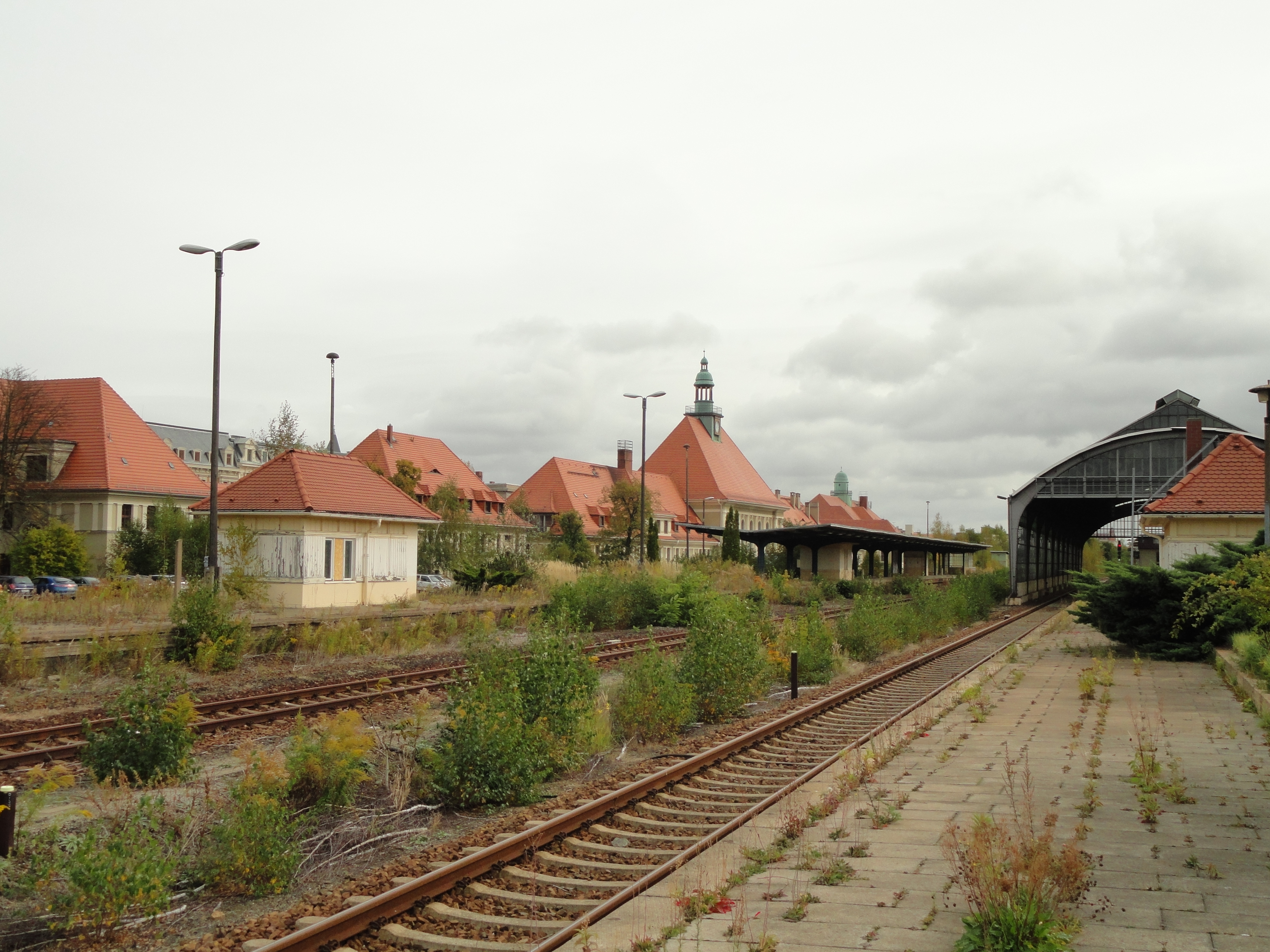 Außenbahnsteig des Bahnhofs Görlitz